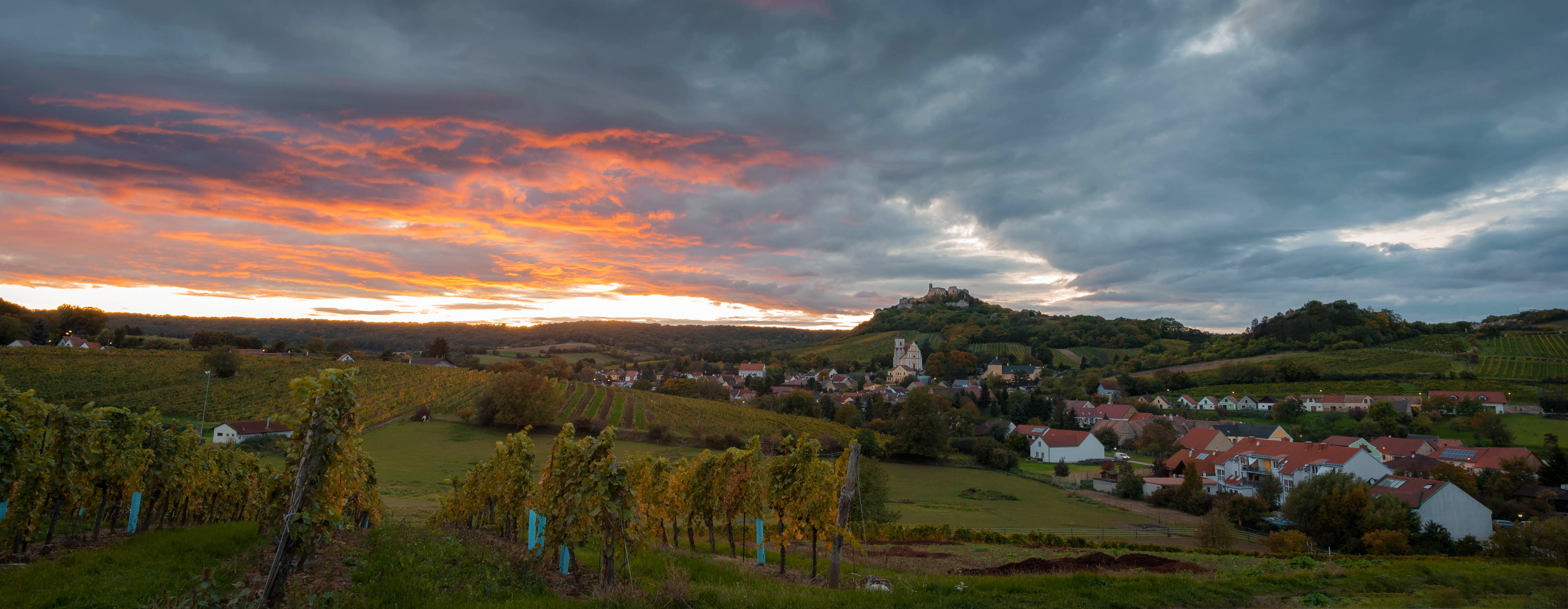 Ruine Falkenstein